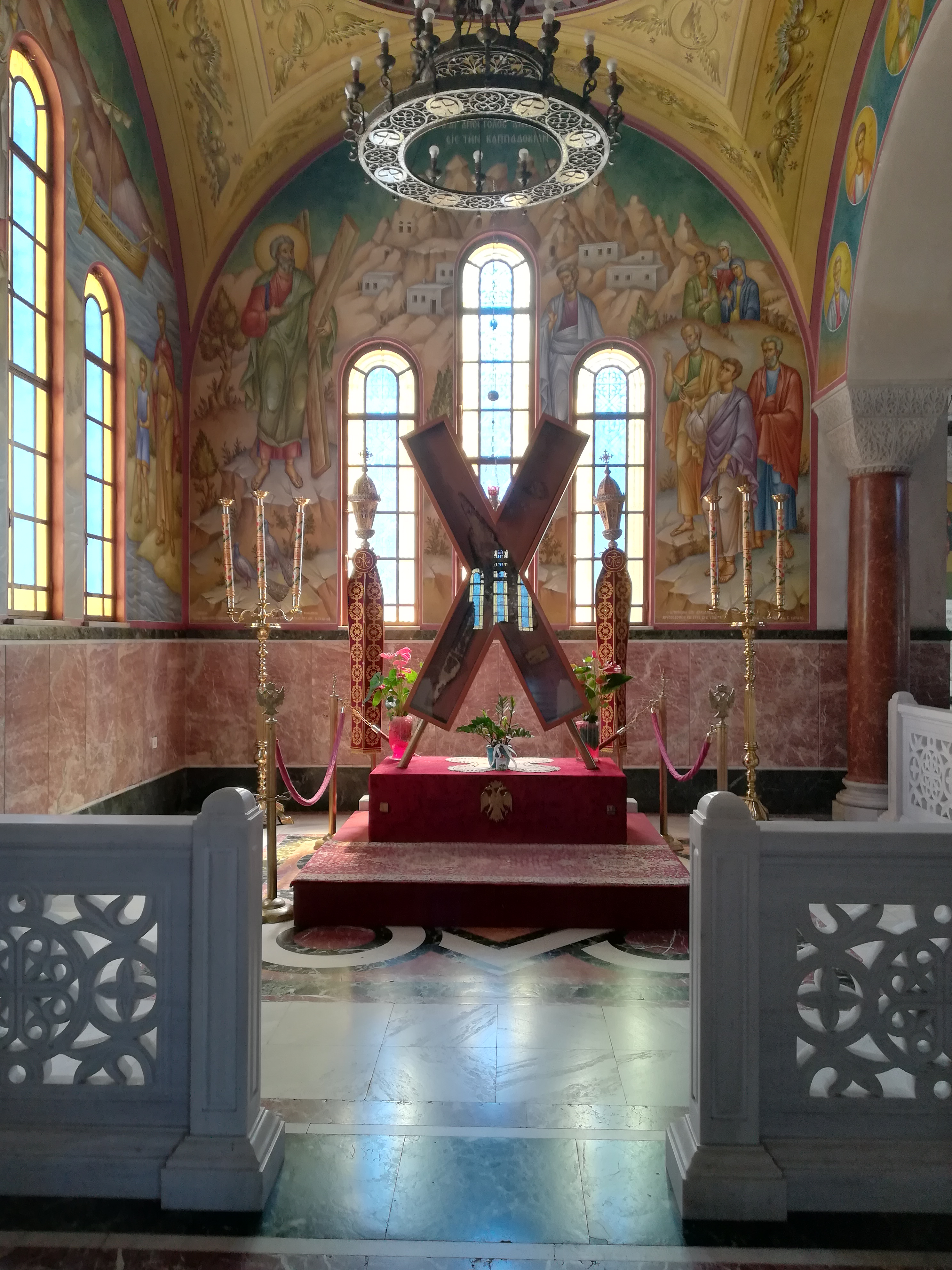 Σταυρός μαρτυρίου Αγίου Ανδρέα, Πάτρα